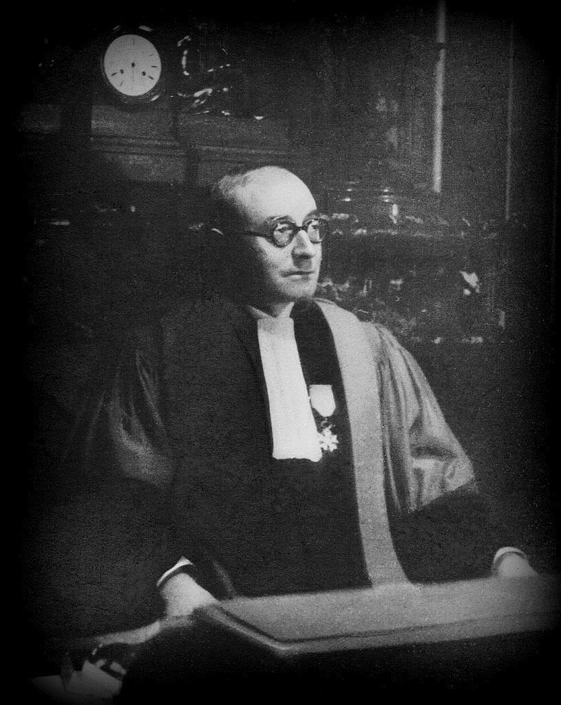 L'avocat-général à la cour de cassation Edmond Miniac (1884-1947), de Saint-Servan-sur-Mer. Collections successives : Louis Miniac (1887-1952), Paul Miniac (1927-1995), Marie-Anne Miniac, Rennes, France.